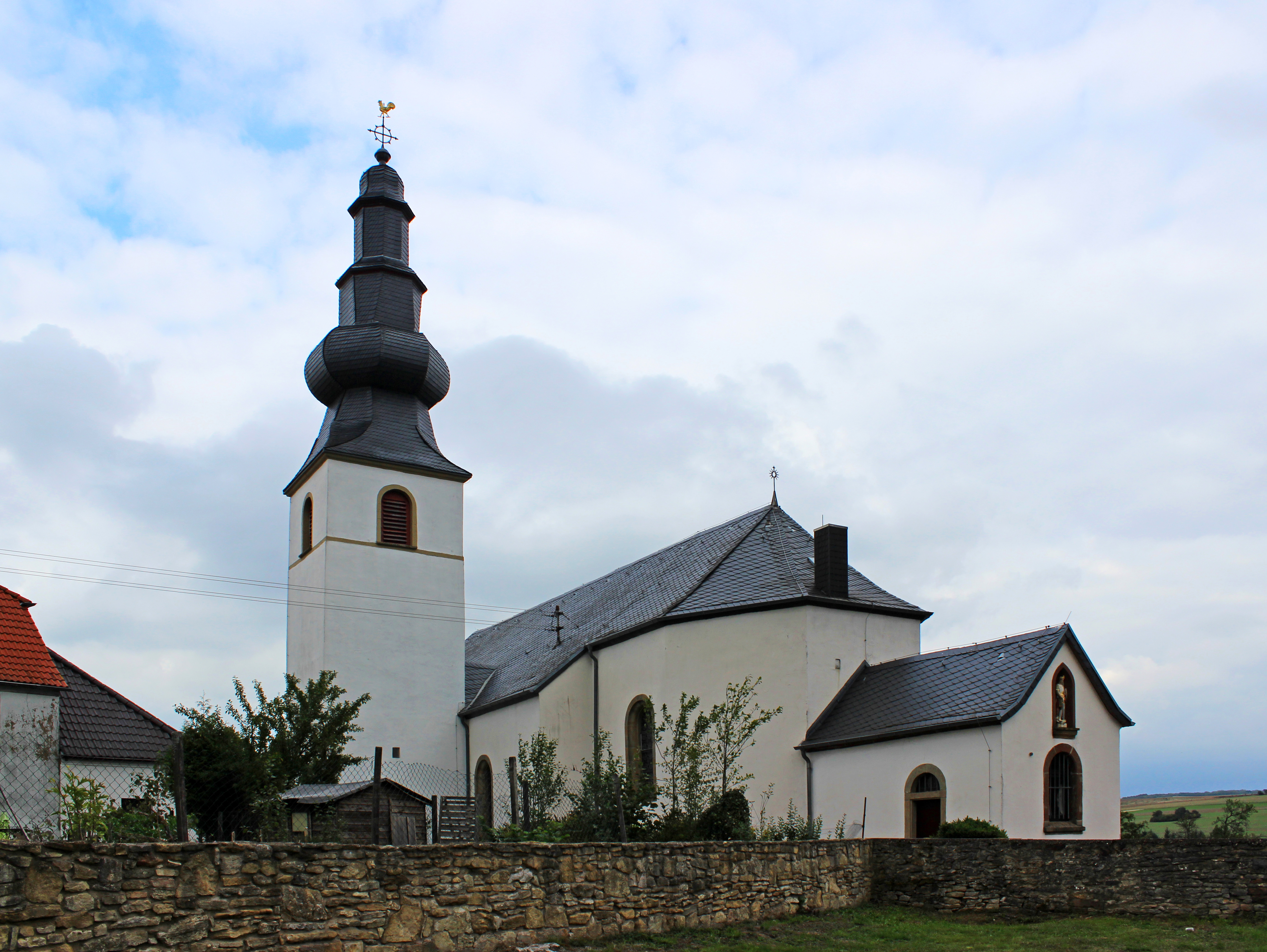 Die katholische Kirche St. Remigius in Leidingen, Gemeinde Wallerfangen, Landkreis Saarlouis, Saarland.